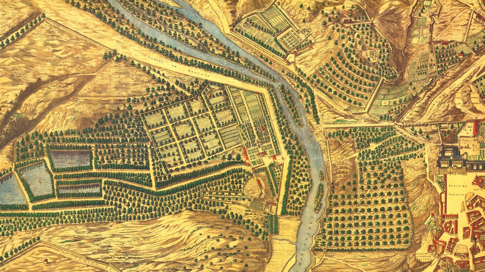 Fragmento de la Casa de Campo, del río Manzanares, de El Parque (Campo del Moro) y del Real Alcázar en el Plano de la villa de Madrid, dibujado por Pedro Teixeira Albernaz en 1656, por encargo de Felipe IV de España. Se identifican sus calles, plazas y edificios, muchos señalados con sus nombres. El plano está realizado en perspectiva caballera, de sur a norte. Está grabado en 20 planchas de 45x56 cm cada una, midiendo 2,85 x 1,80 metros, a una escala de 1:1.800.